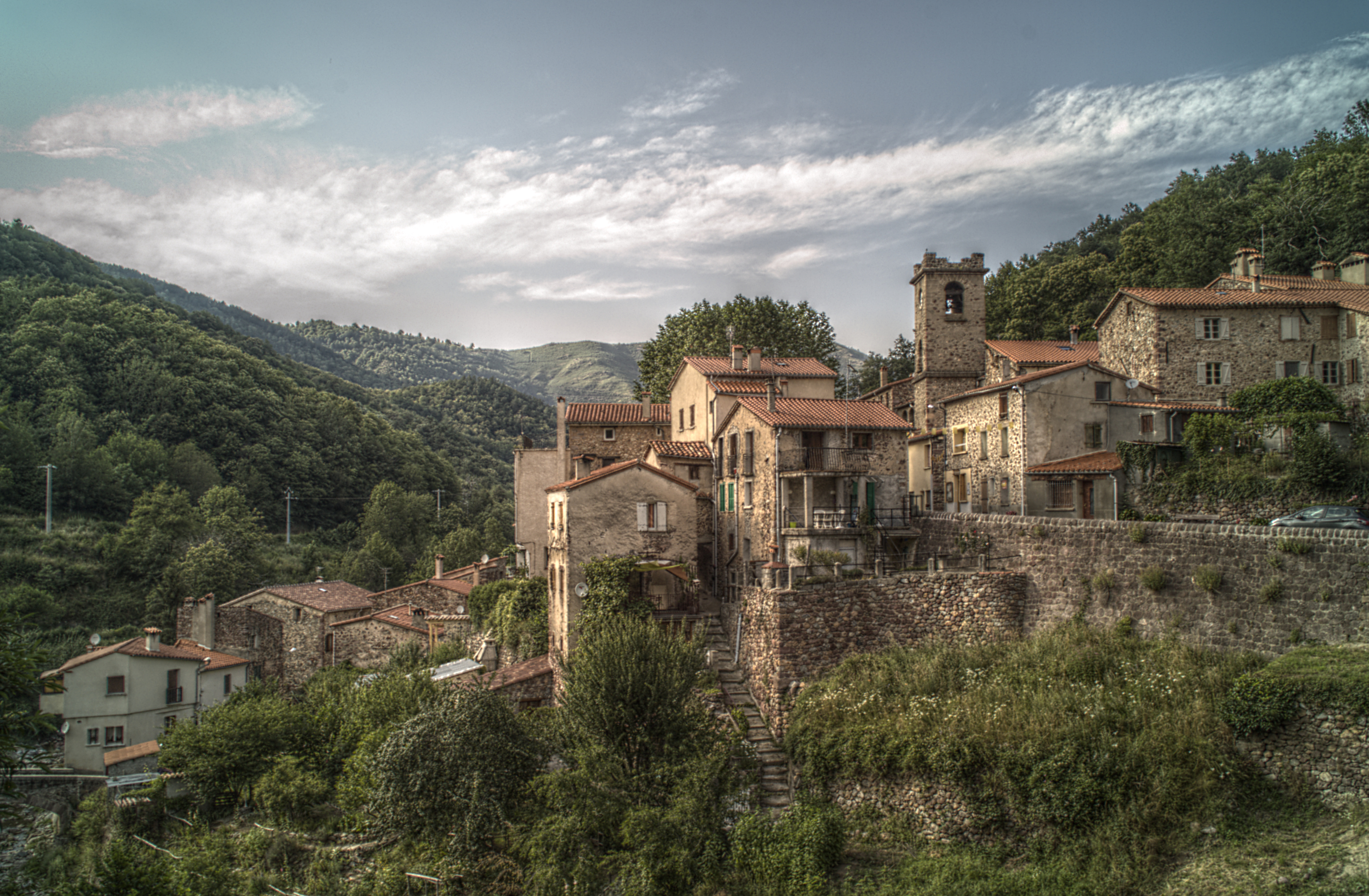 Vue générale, Lamanère (Pyrénées-Orientales, Languedoc-Roussillon, France)